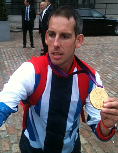 Etienne Stott let me touch his gold medal! Ooooooooh! :-)